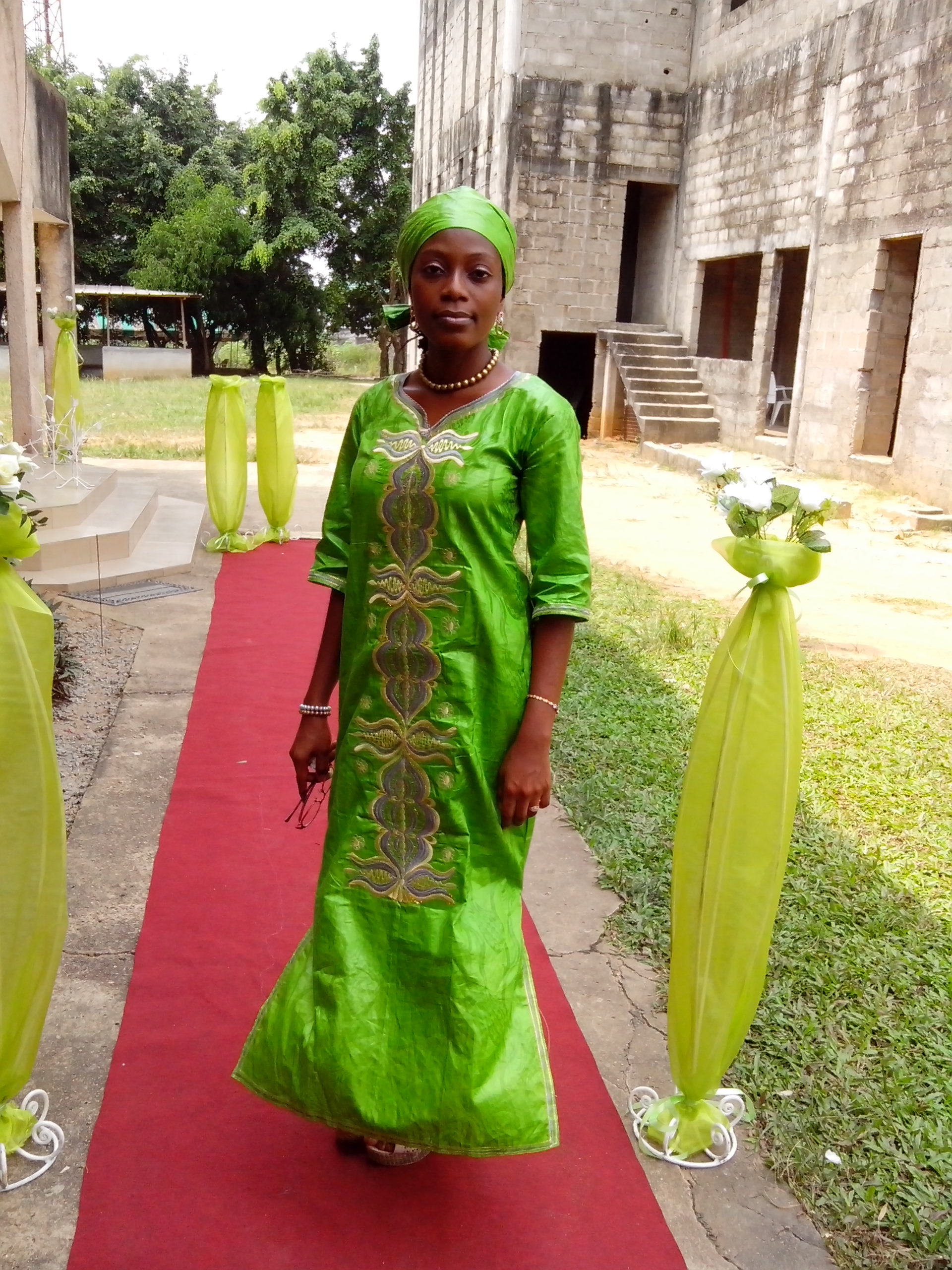 boubou en basin brodé avec des fils en dorés This is an image of Cultural Fashion or Adornment from Ivory Coast